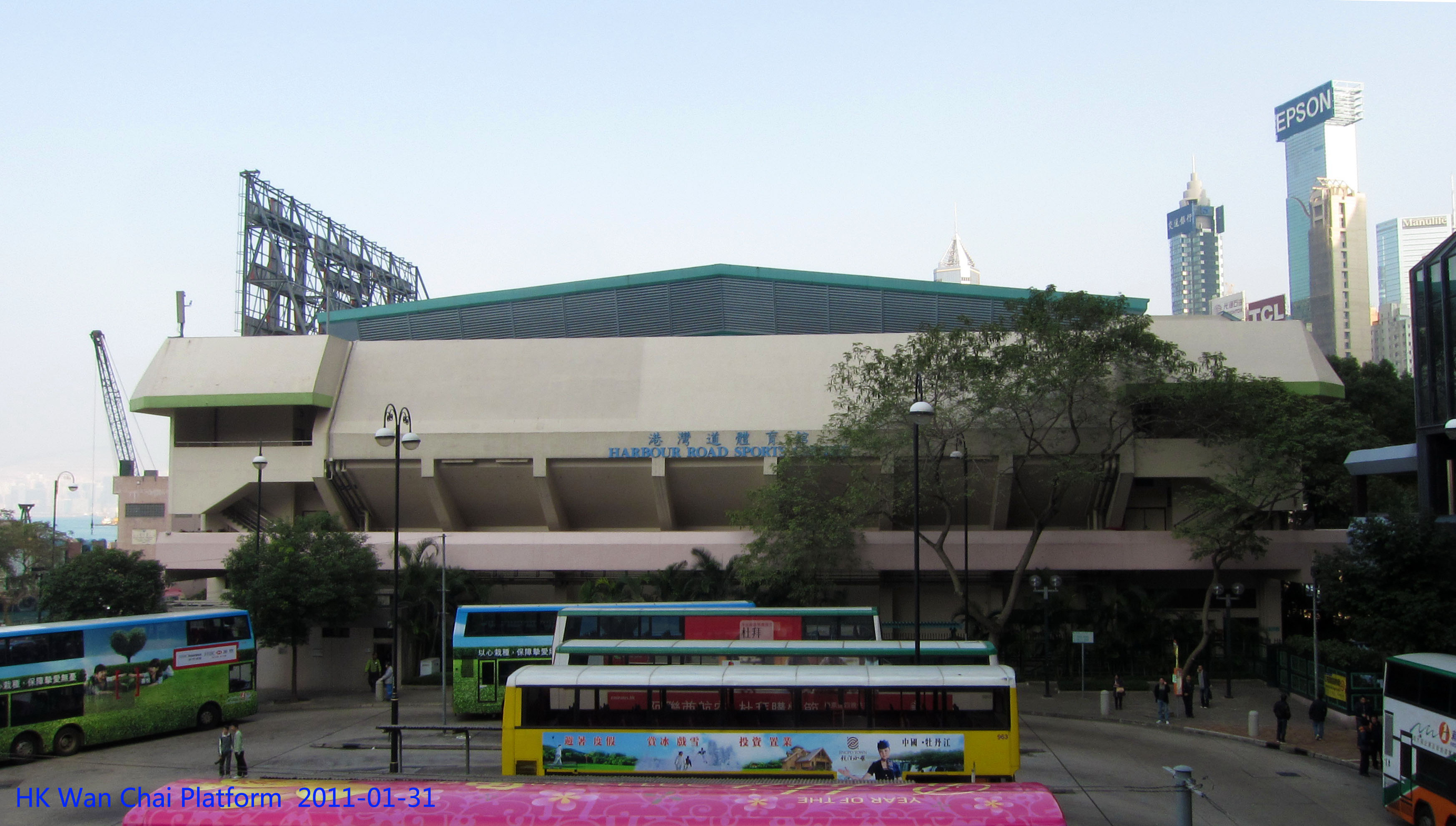 湾仔道体育馆 HARBOUR ROAD SPORTS CENTRE